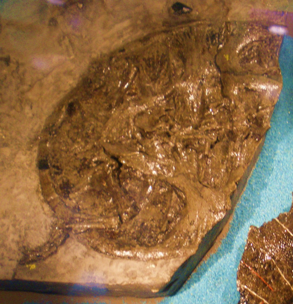 Fossil of Chitracephalus, an extinct turtle Took the photo at Musee d'Histoire Naturelle, Brussels